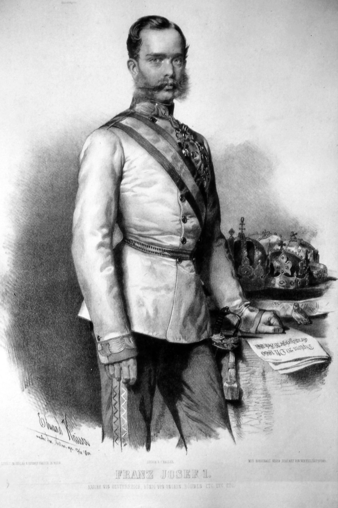 Franz Joseph I. (1830-1916), Kaiser von Österreich, König von Ungarn etc. etc. Lithographie von Eduard Kaiser, 1861